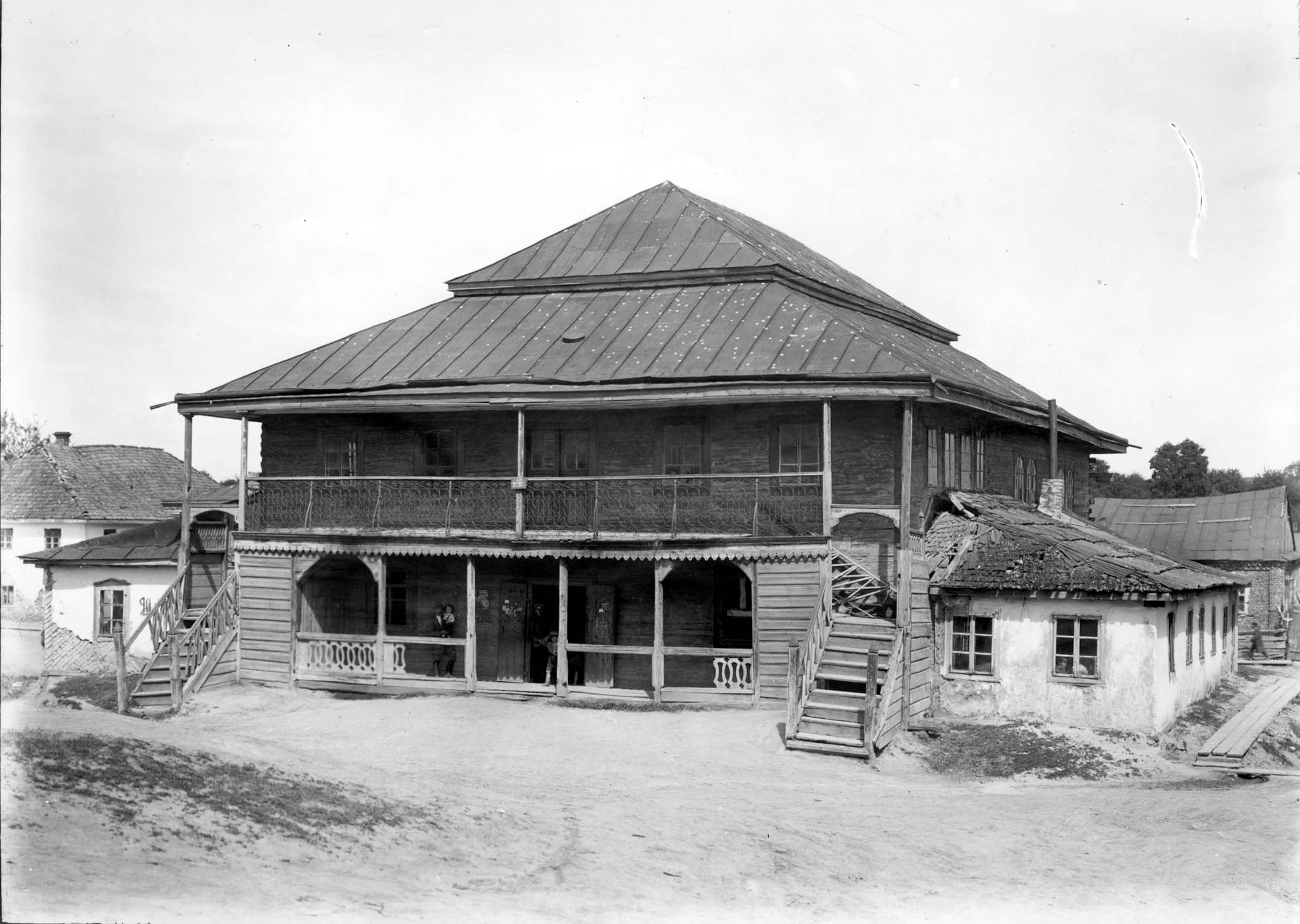 Дерев'яна синагога в Олиці.